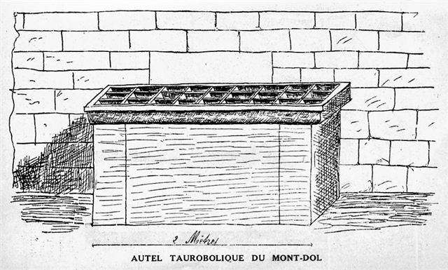 Autel taurobolique du Mont-Dol. Sa table, percée de trois rangs de neuf quadrilatères en entonnoir, reposait, par ses bords sur trois pièces de support, de manière que l'autel restât creux (relevé des plans par M. Anfray, ingénieur du département d'Ille-et-Vilaine, 1802).